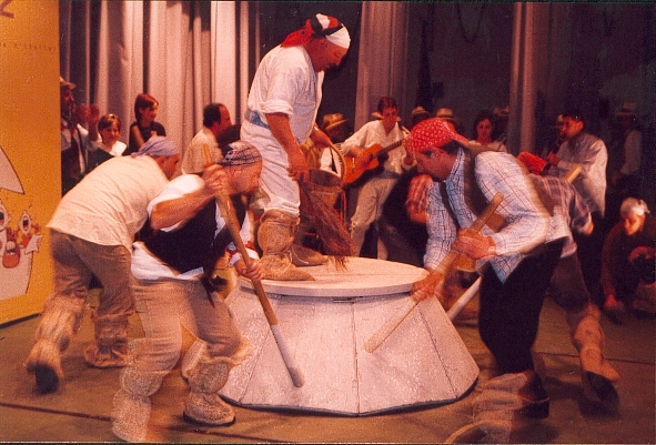 A vattut´ e ll´astreche